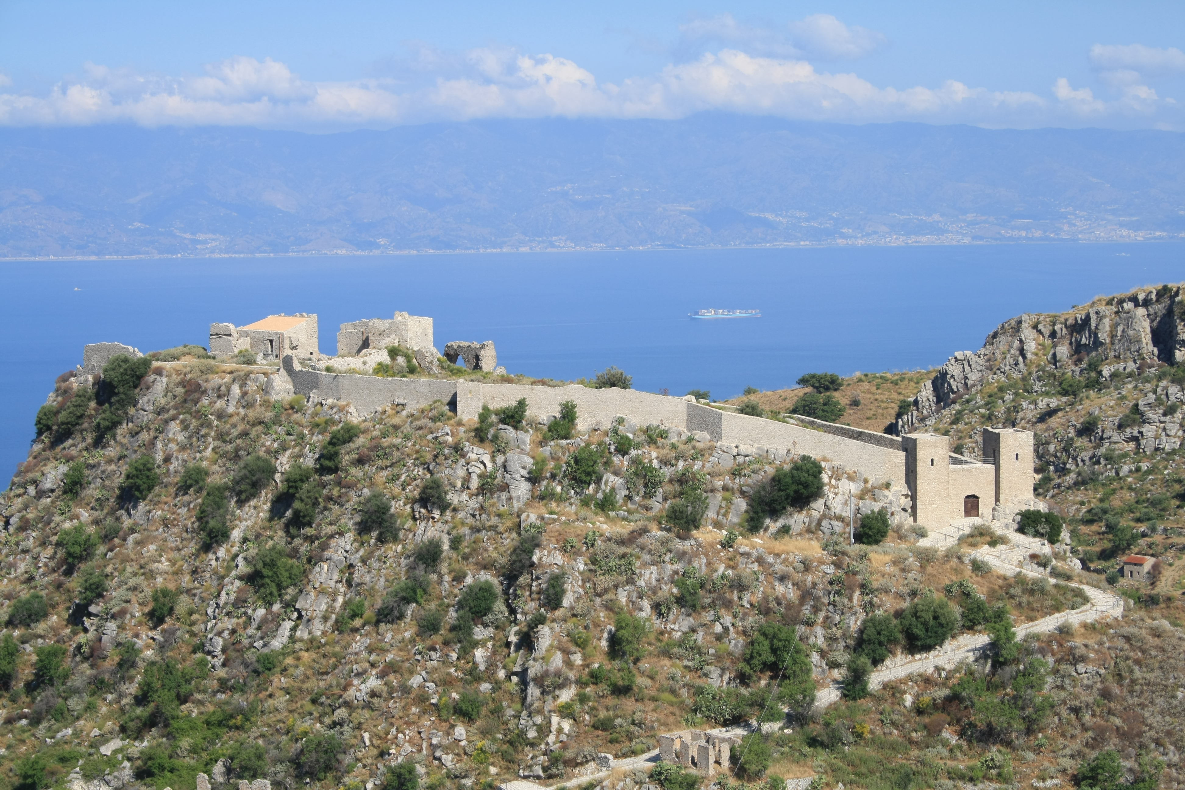 Veduta del castello di San Niceto (Motta San Giovanni) Italy.